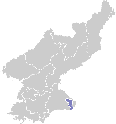 강원도 금강산관광지구 행정구역지도